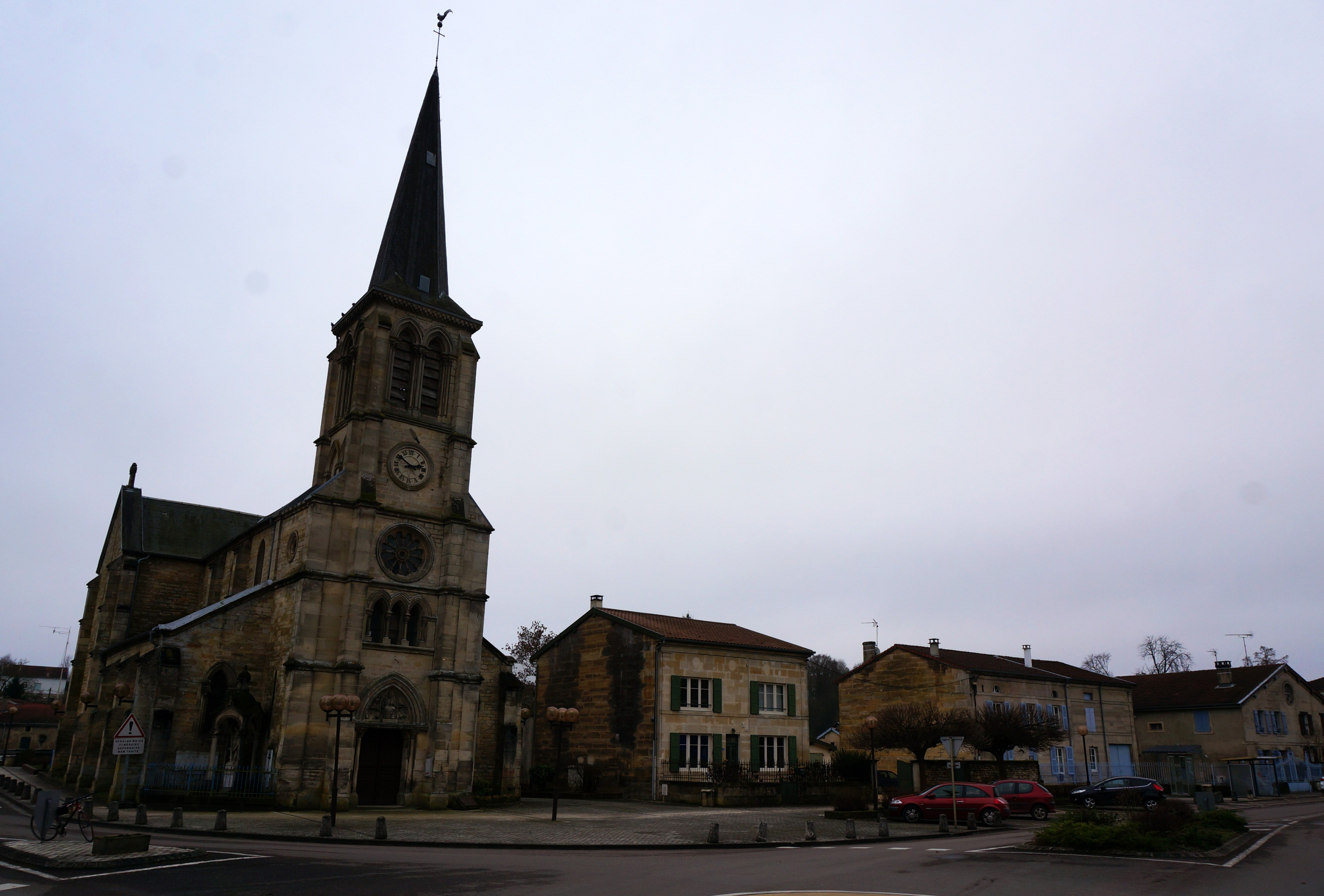 prise de vue de Lisle-en-Rigault.